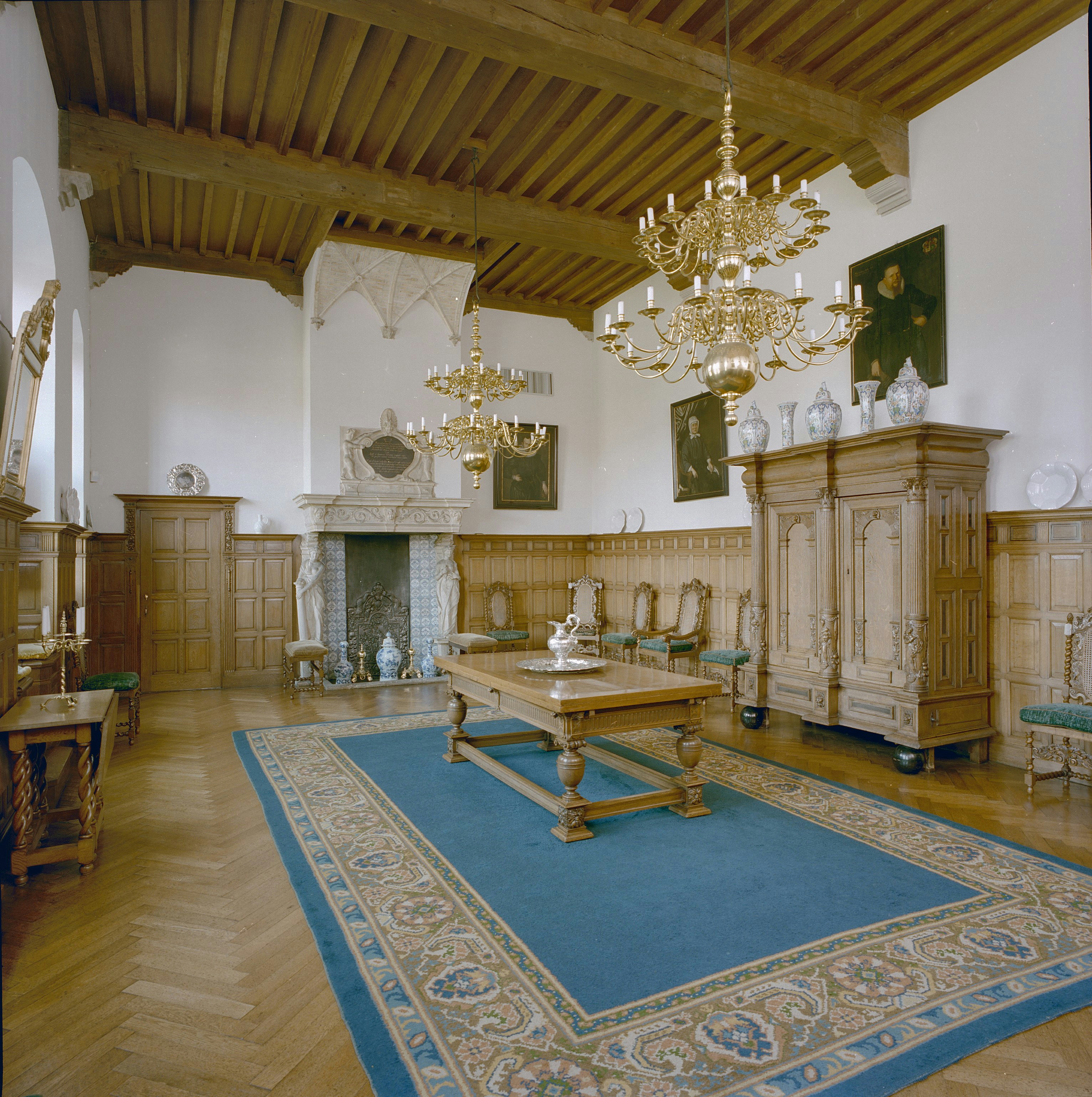 Heringastate of het zogenaamde Popta-slot: Interieur, overzicht van De Zaal met Friese keeftkast , schouw en kroonluchters (opmerking: Gefotografeerd voor Wonen in Arcadië)